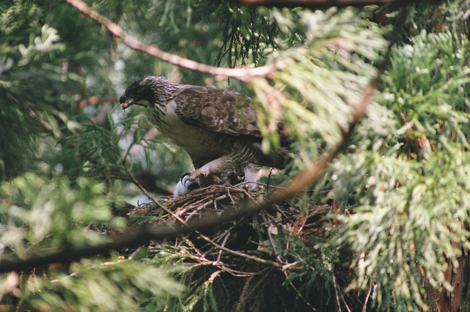 八木沢マタギ クマタカ